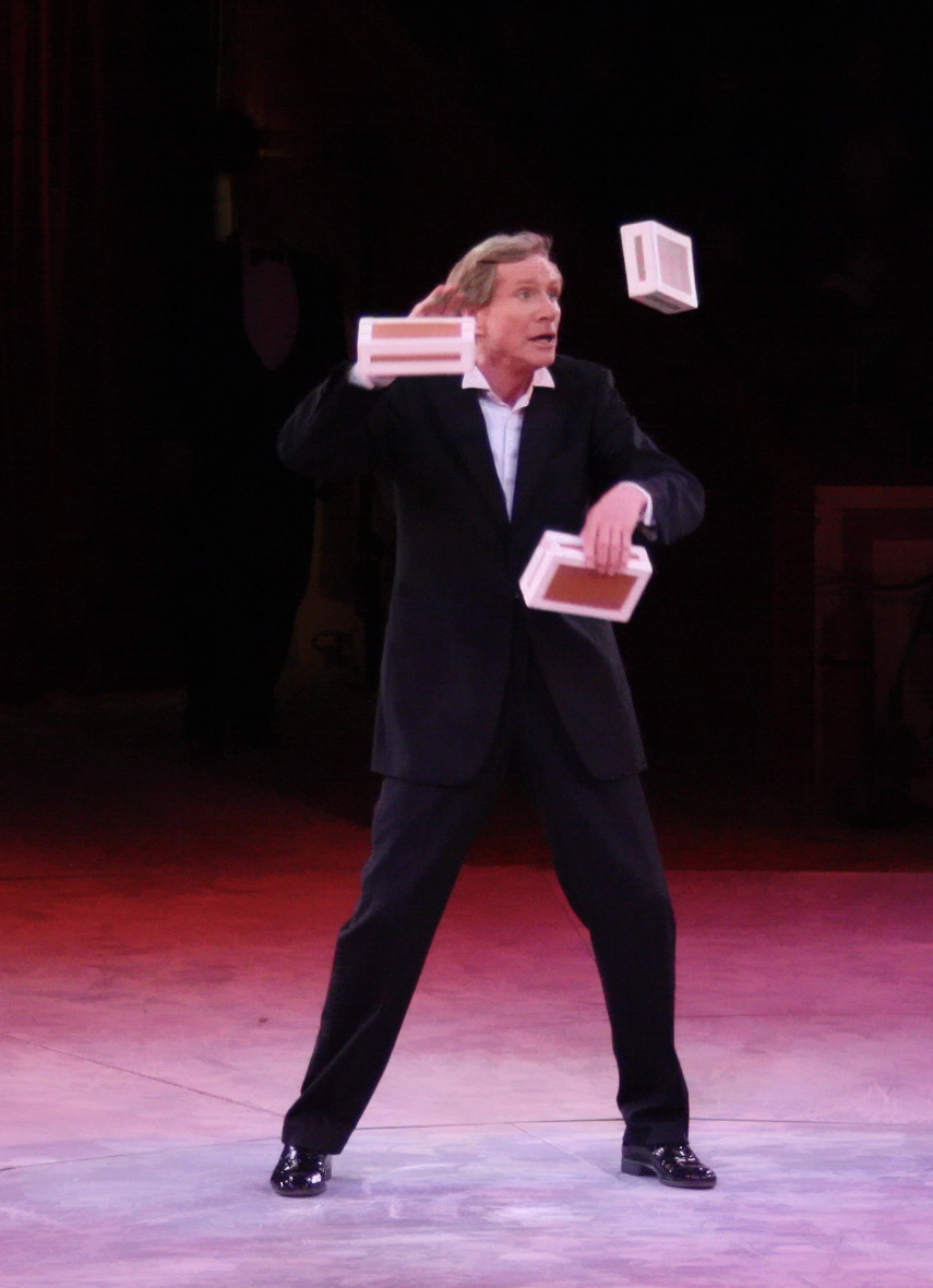 Der schweizer Jongleur KRIS KREMO jongliert mit Zigarrenschachteln.